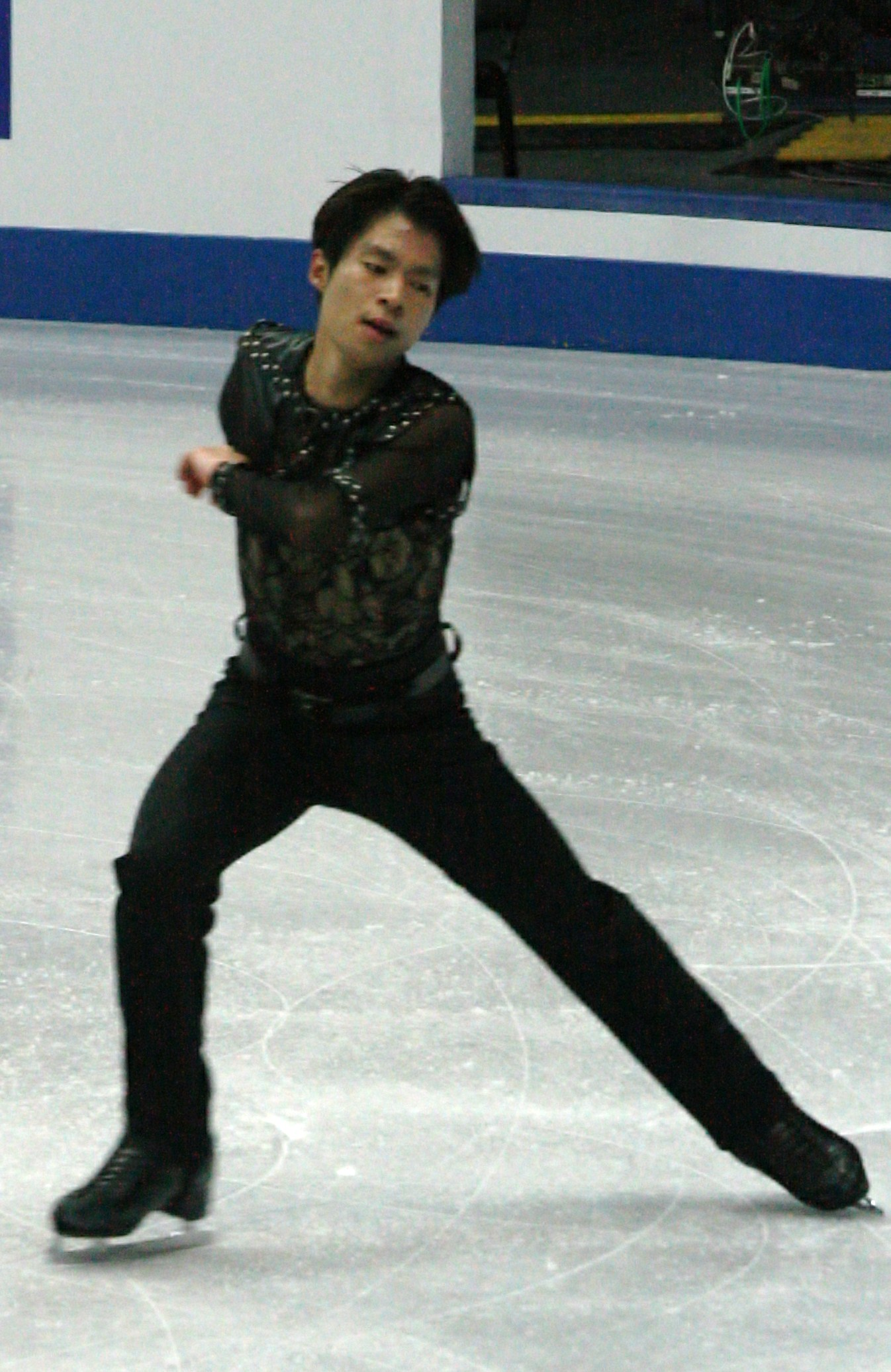 Тацуки Матида (Япония) на финале Гран-при 2012-2013. Короткая программа.